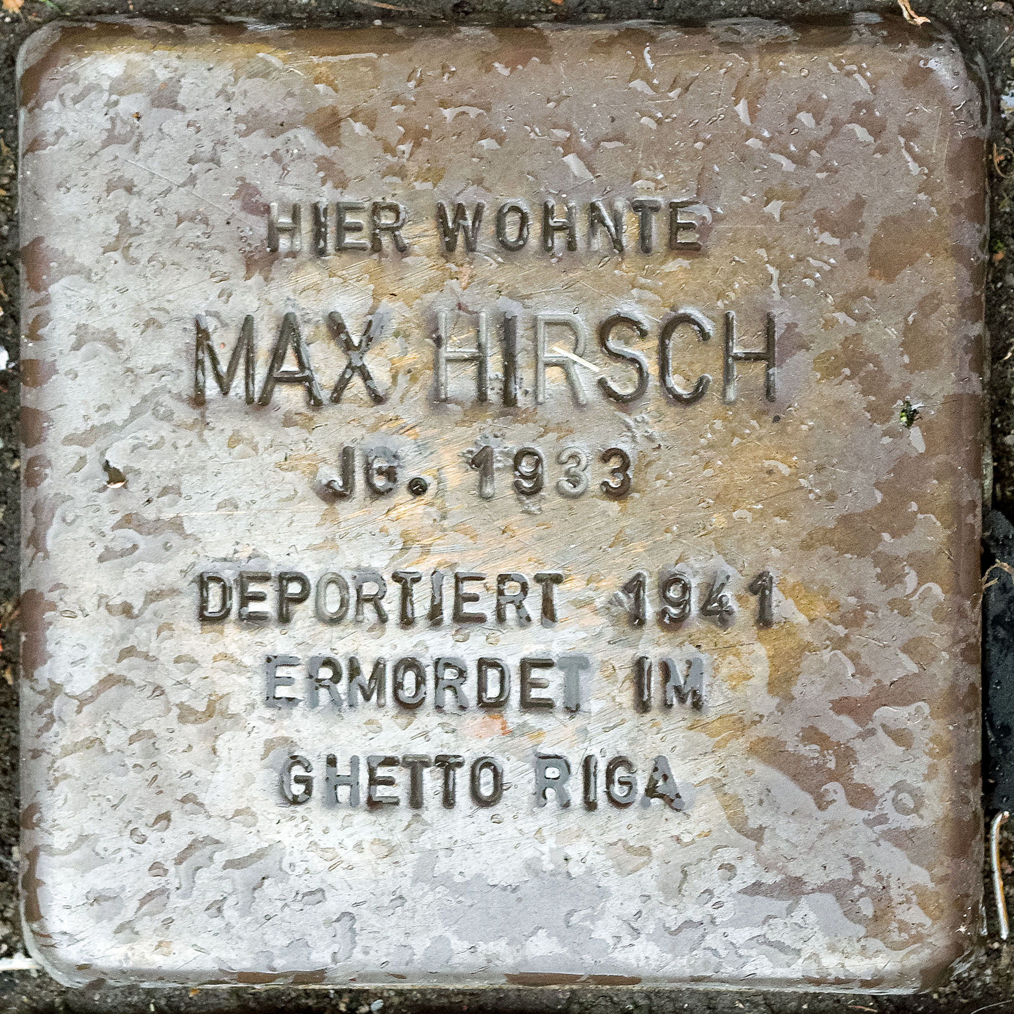 Stolpersteine in Viersen: Hirsch, Max